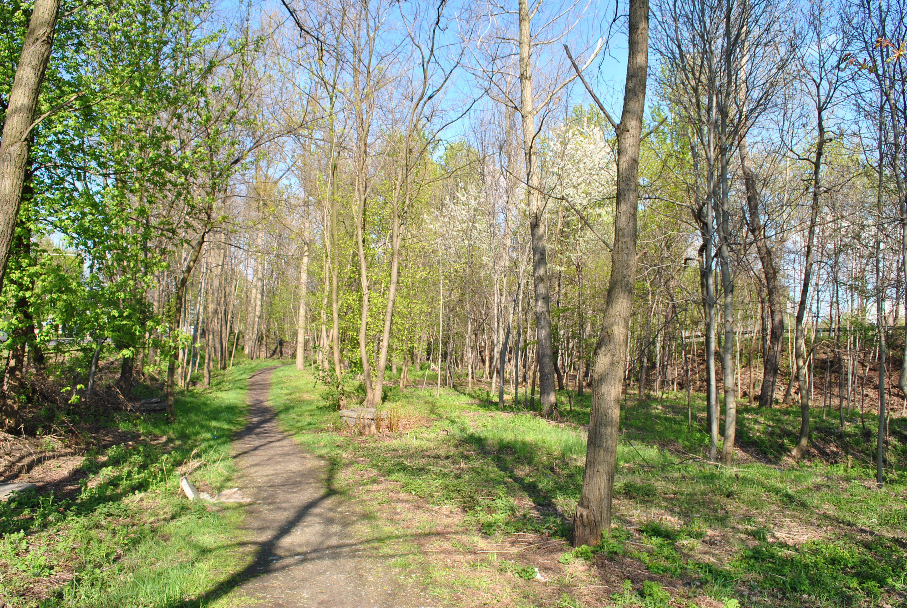 Katowice - Załęże. Mały kompleks leśny przy ul. Gliwickiej i Jana Pawła II